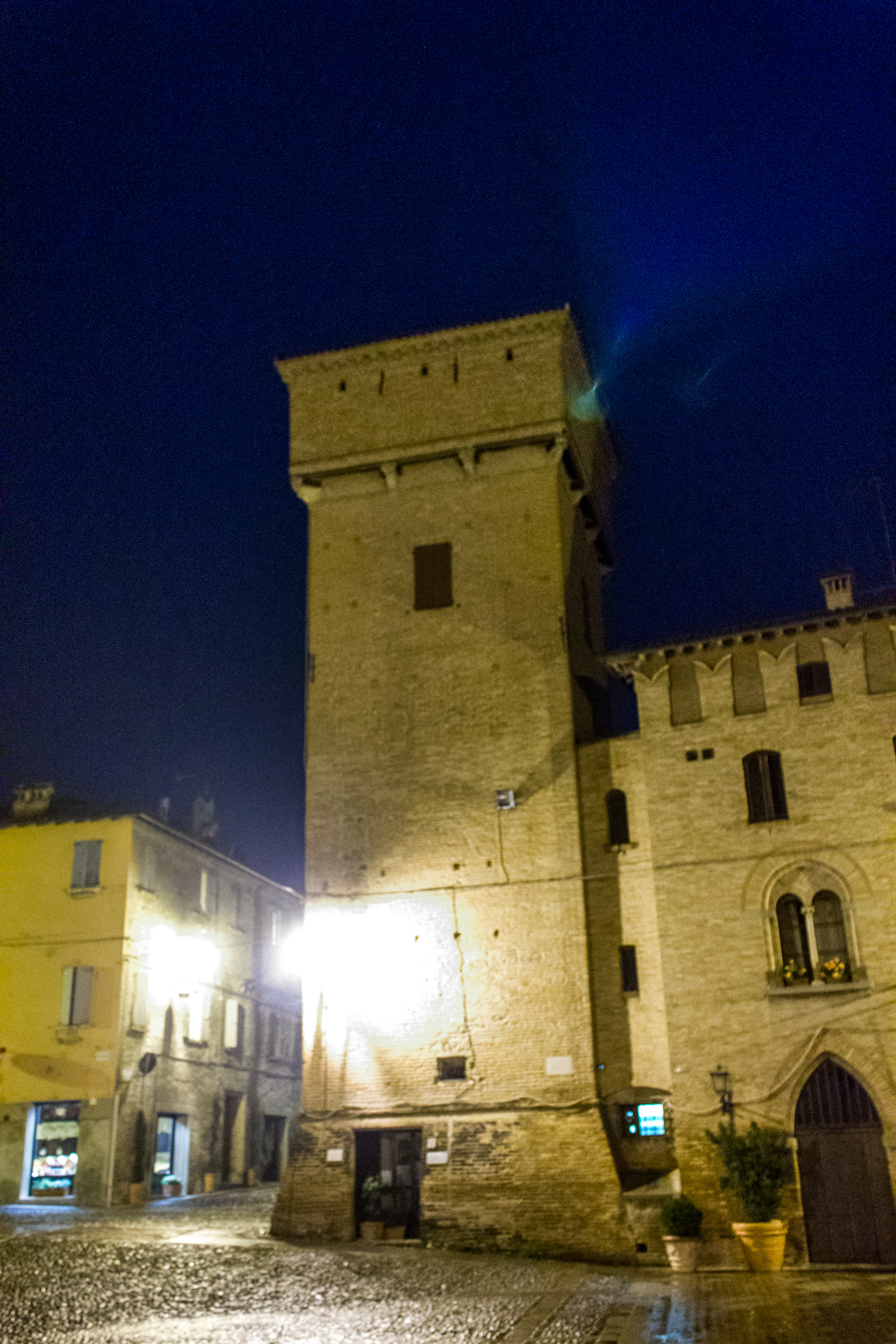 Torre delle Prigioni - MIBAC This is a photo of a monument which is part of cultural heritage of Italy.